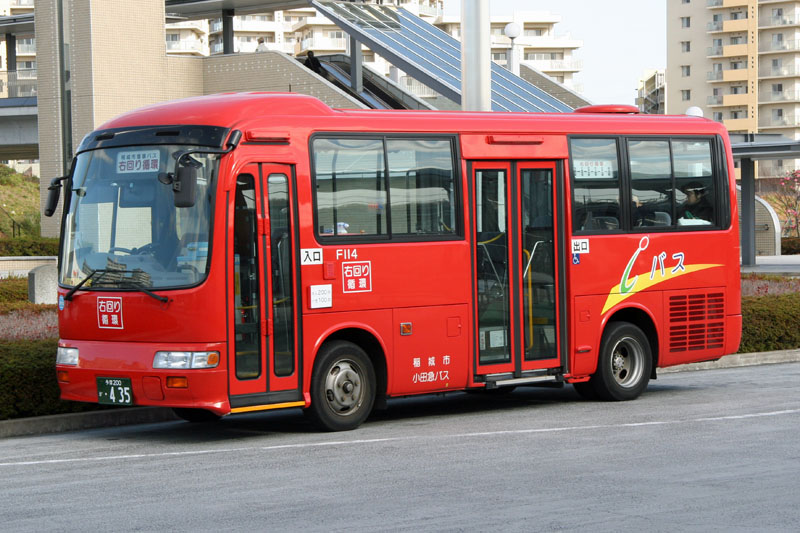 Inagi City Community Bus "i Bus" (Operated by Odakyu Bus / Car No.F114 / Hino Liesse KK-RX4JFEA / Hino body) at Wakabadai Station, Asao-ku, Kawasaki, Kanagawa, Japan